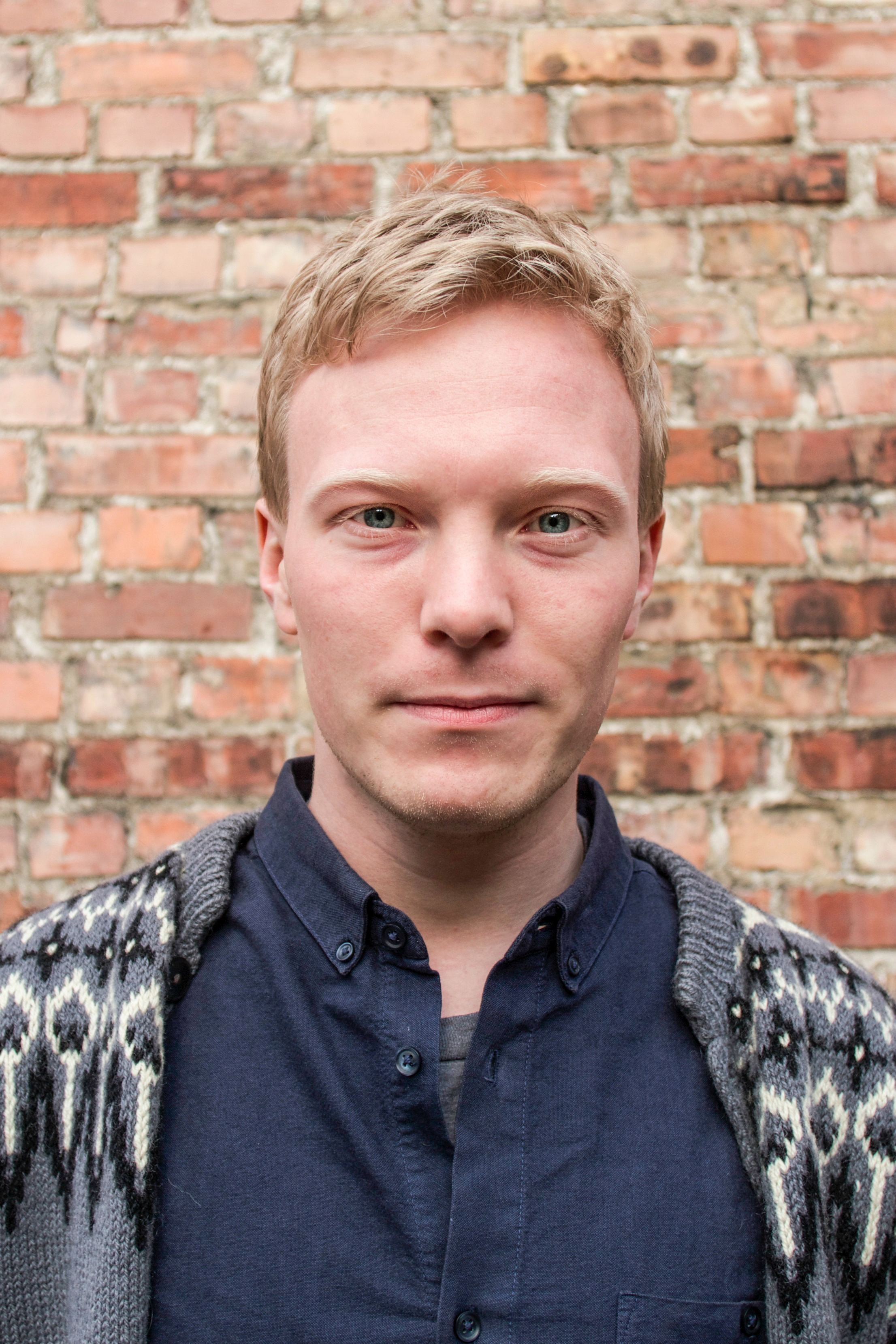 Arnstein Vestre, leder i Natur og Ungdom 2014